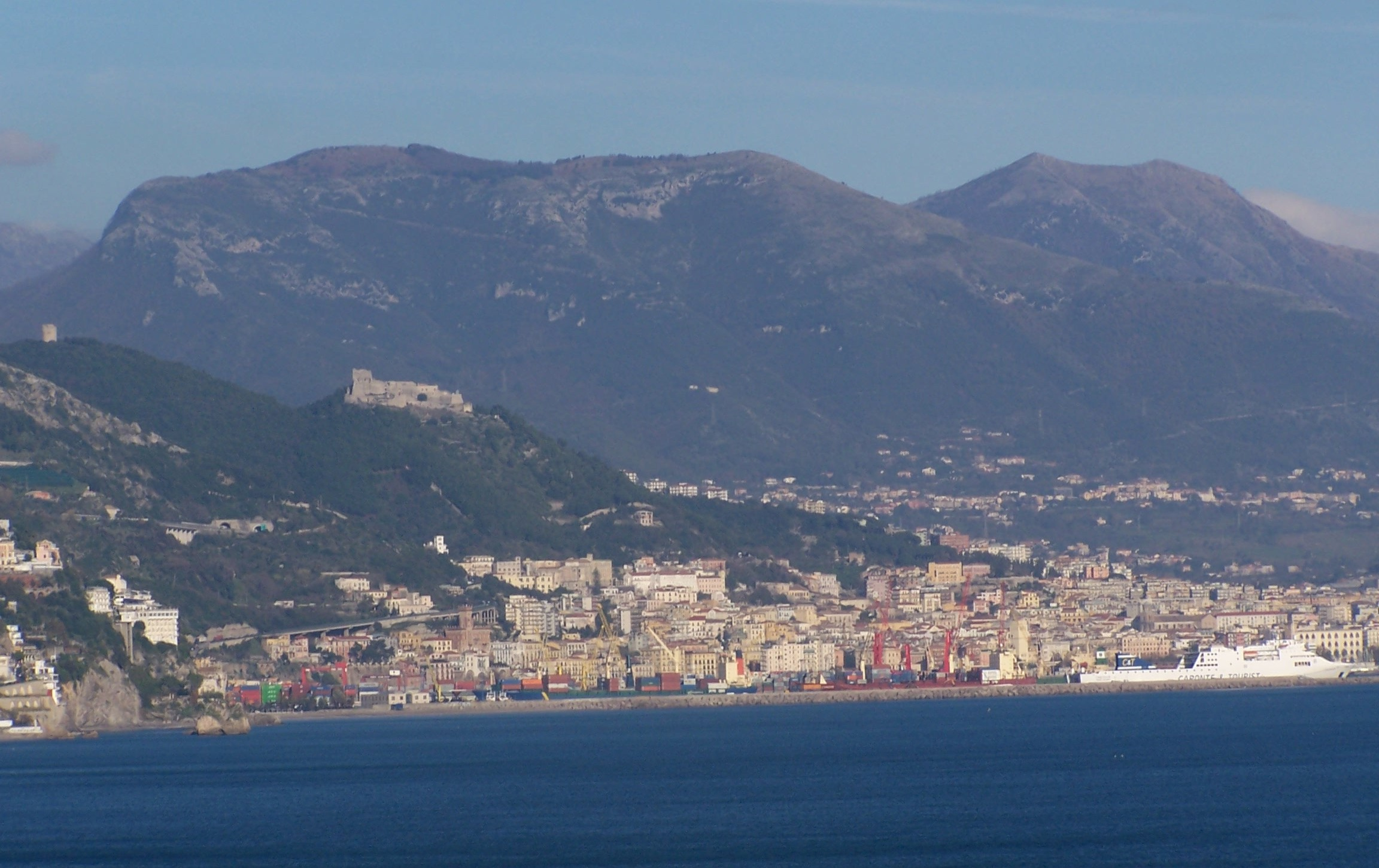 Il centro storico di Salerno visto da Cetara(Costiera Amalfitna). Foto personala scattata da me. Cetara, Dicembre 2006.